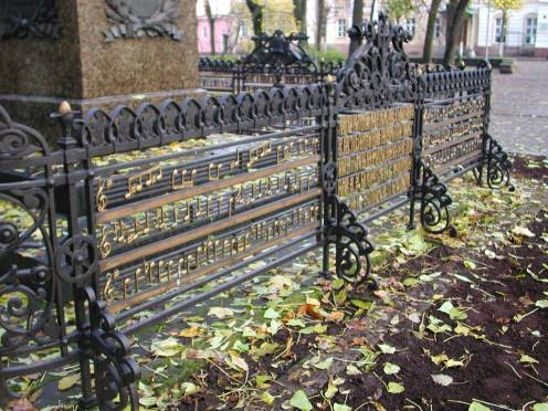 Ограда памятника Глинке в Смоленске